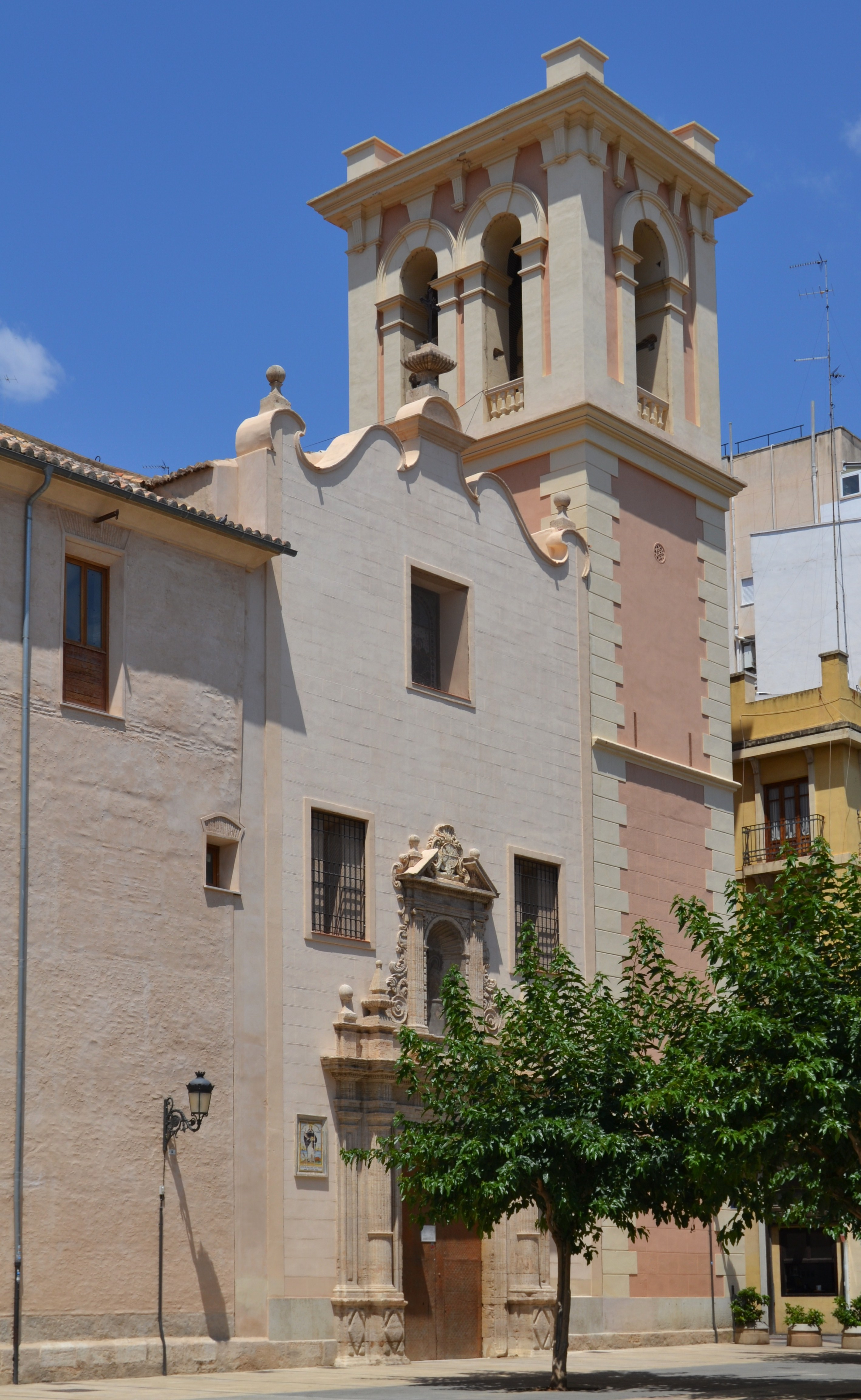 Església del Pilar (València).